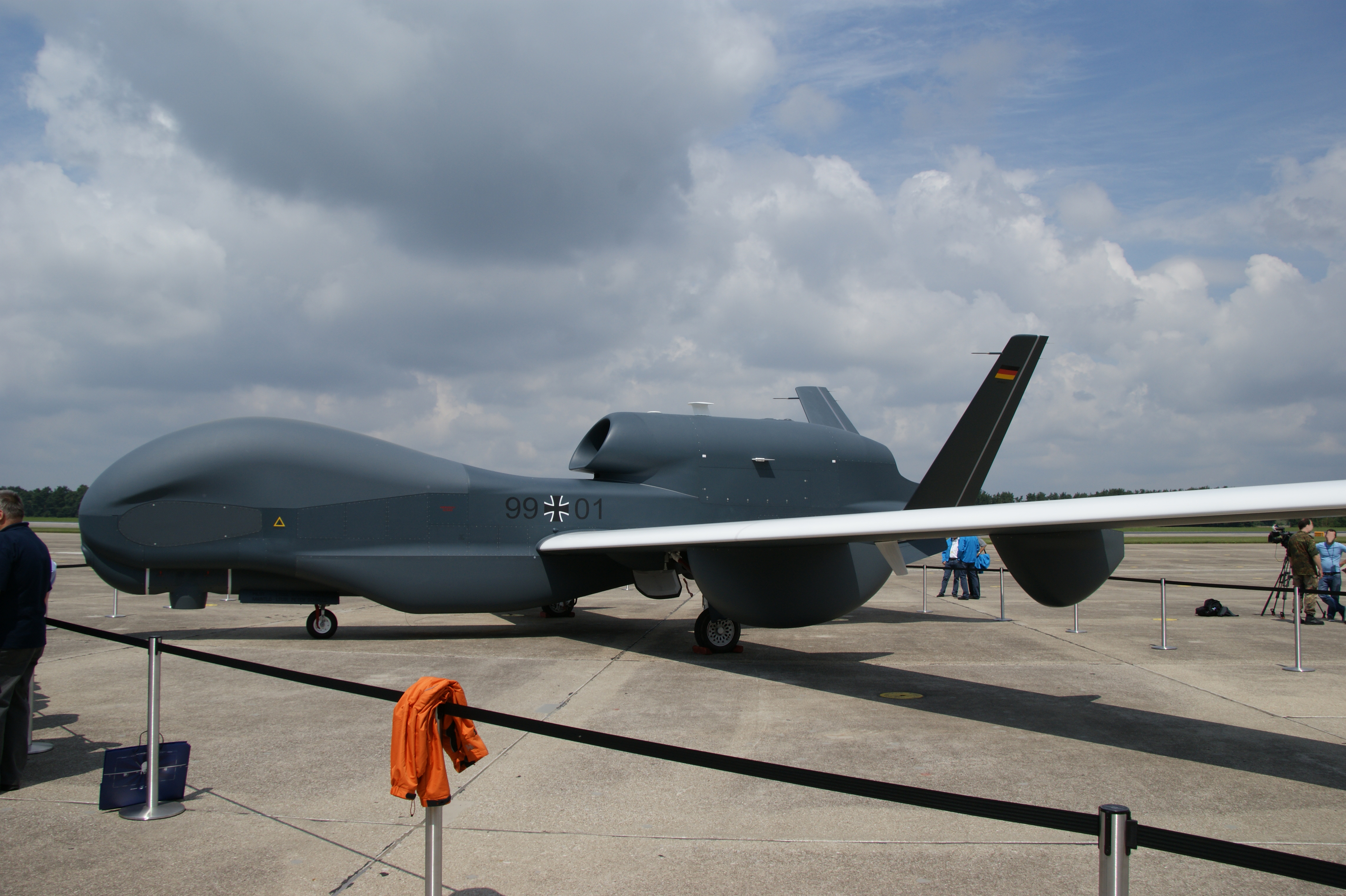 EuroHawk nach der Landung am 21.07.2011 bei der WTD61 in Manching nach 20 stündigen Flug von EAFB in USA.